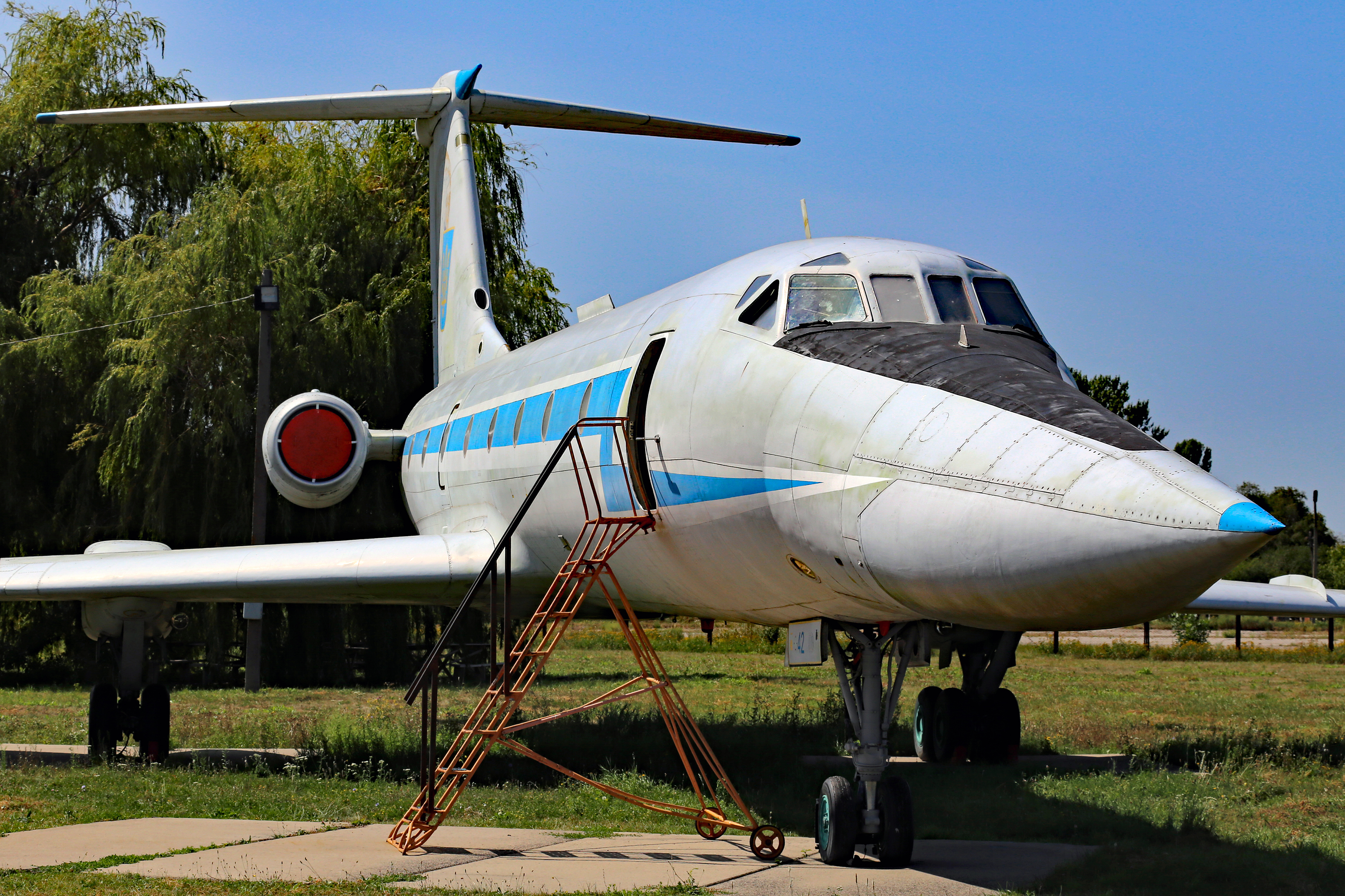 Tu-134UB-L im Museum der Fernfliegerkräfte im ukrainischen Poltawa